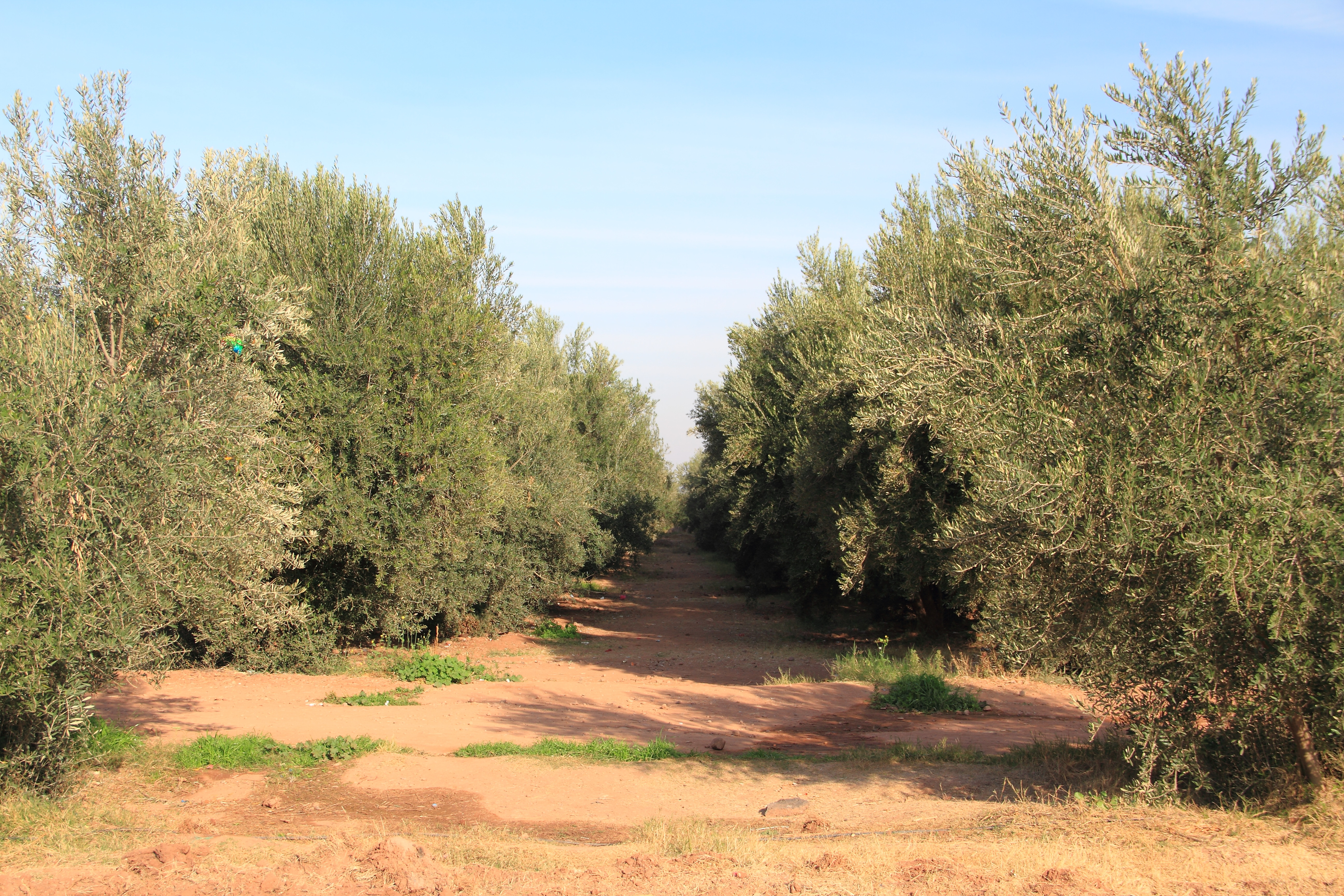 Blick in den Olivenhain des Menaragartens in Marrakesch.